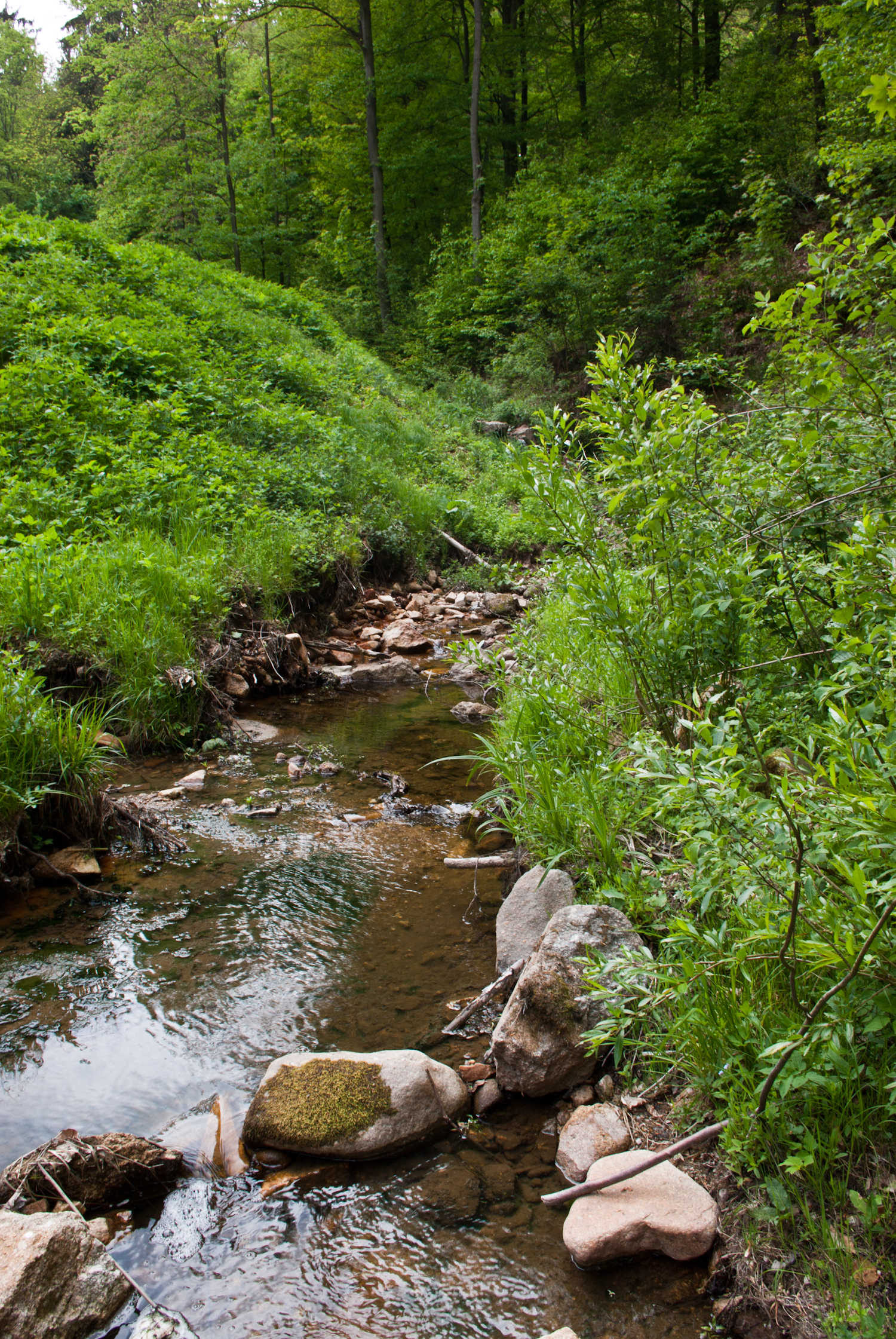 Kamenitý potok (též Supí potok), Slavkovský les, jz. od Lokte n. Ohří